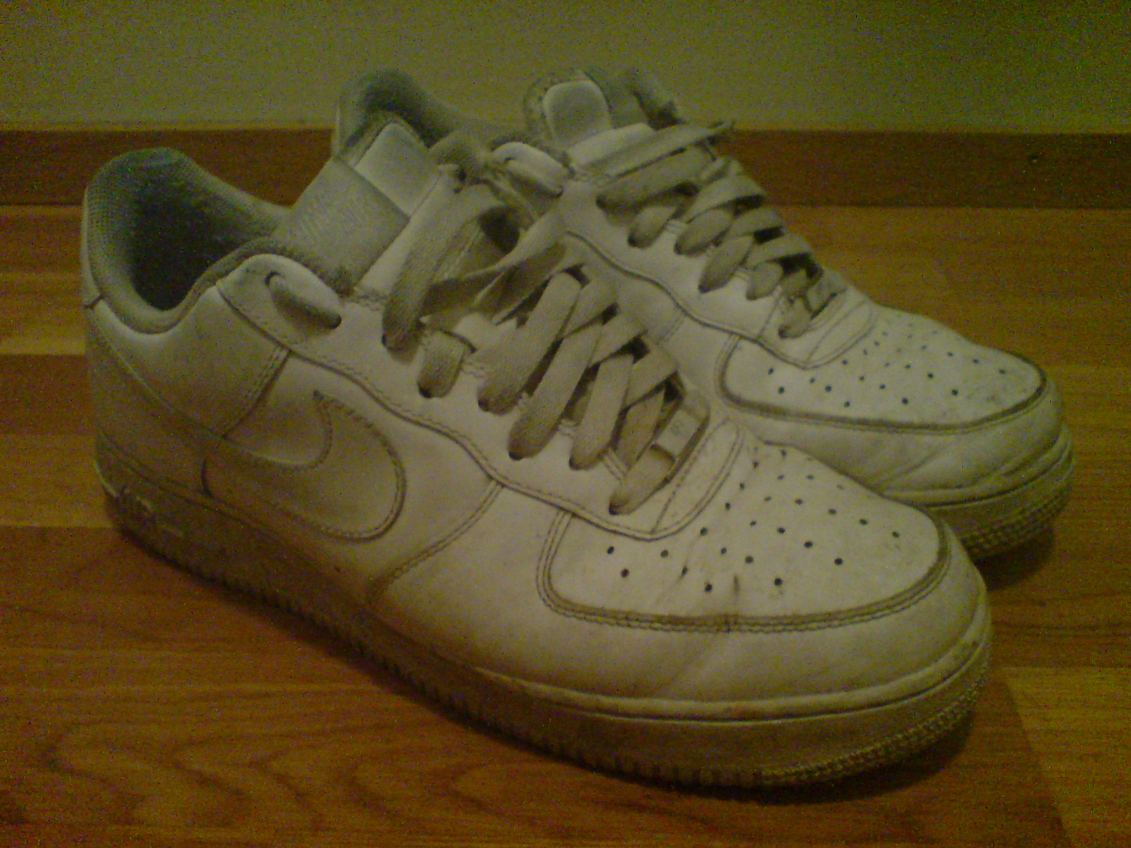 Description